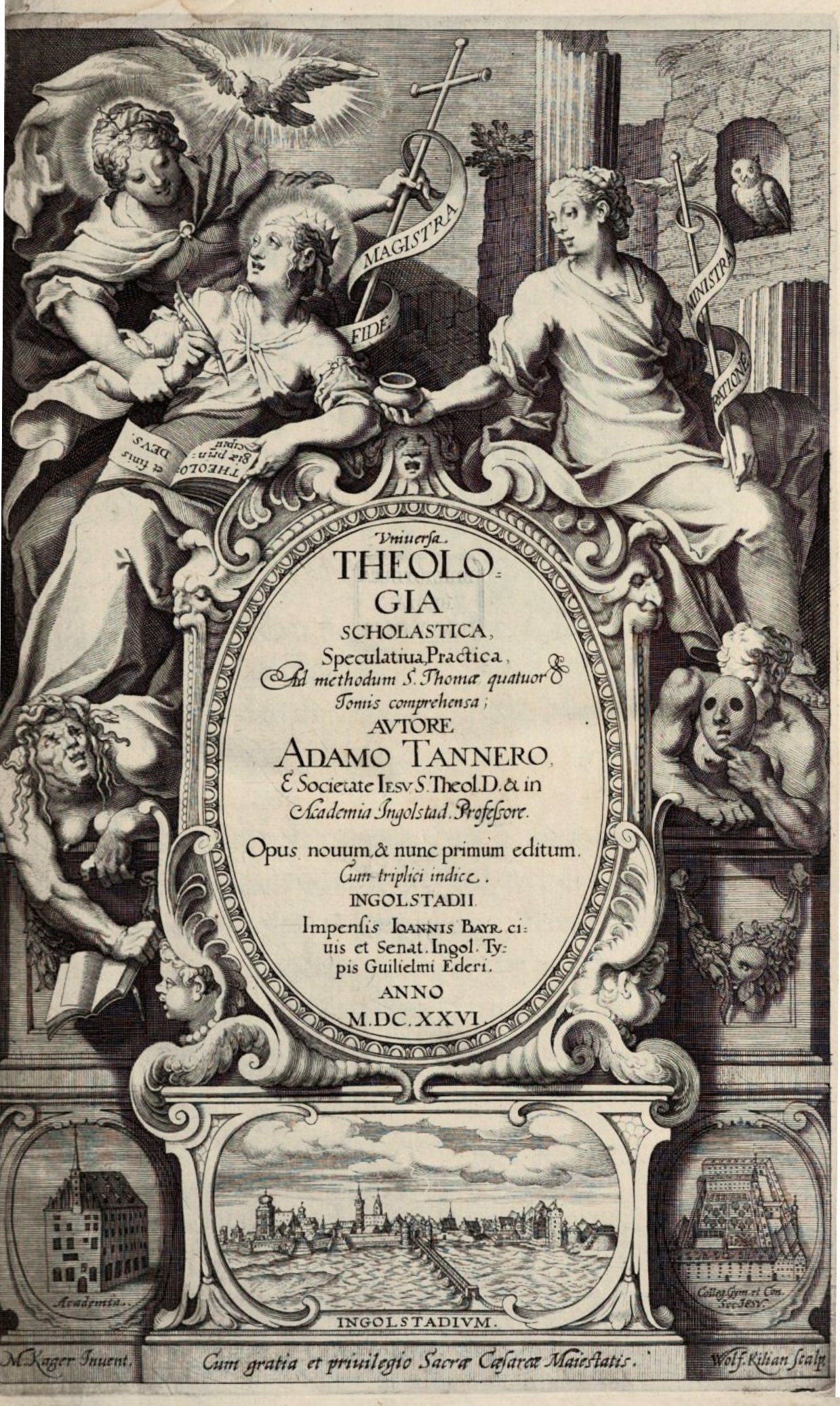 Titelblatt des ersten Bandes der 1626 erschienenen Universa Theologia Scholastica von Adam Tanner. Im oberen Teil die Allegorieen des Glaubens und der Vernunft. Spruchbänder verdeutlichen die Rangordnung zwischen beiden – bzw. zwischen Theologie und Wissenschaft – durch die Worte „Fide, Magistra“ (Glaube, Lehrmeisterin) bzw. „Ratione, Ministra“ (Vernunft, Dienerin). Ein Bote des durch eine Taube symbolisierten Heiligen Geists führt der Theologie die Hand; rechts in einer Mauernische ist als Attribut der Wissenschaft die Eule der Minerva zu sehen. Unten flankieren Abbildungen der Akademie und des Jesuiten-Kollegs die Ansicht von Ingolstadt